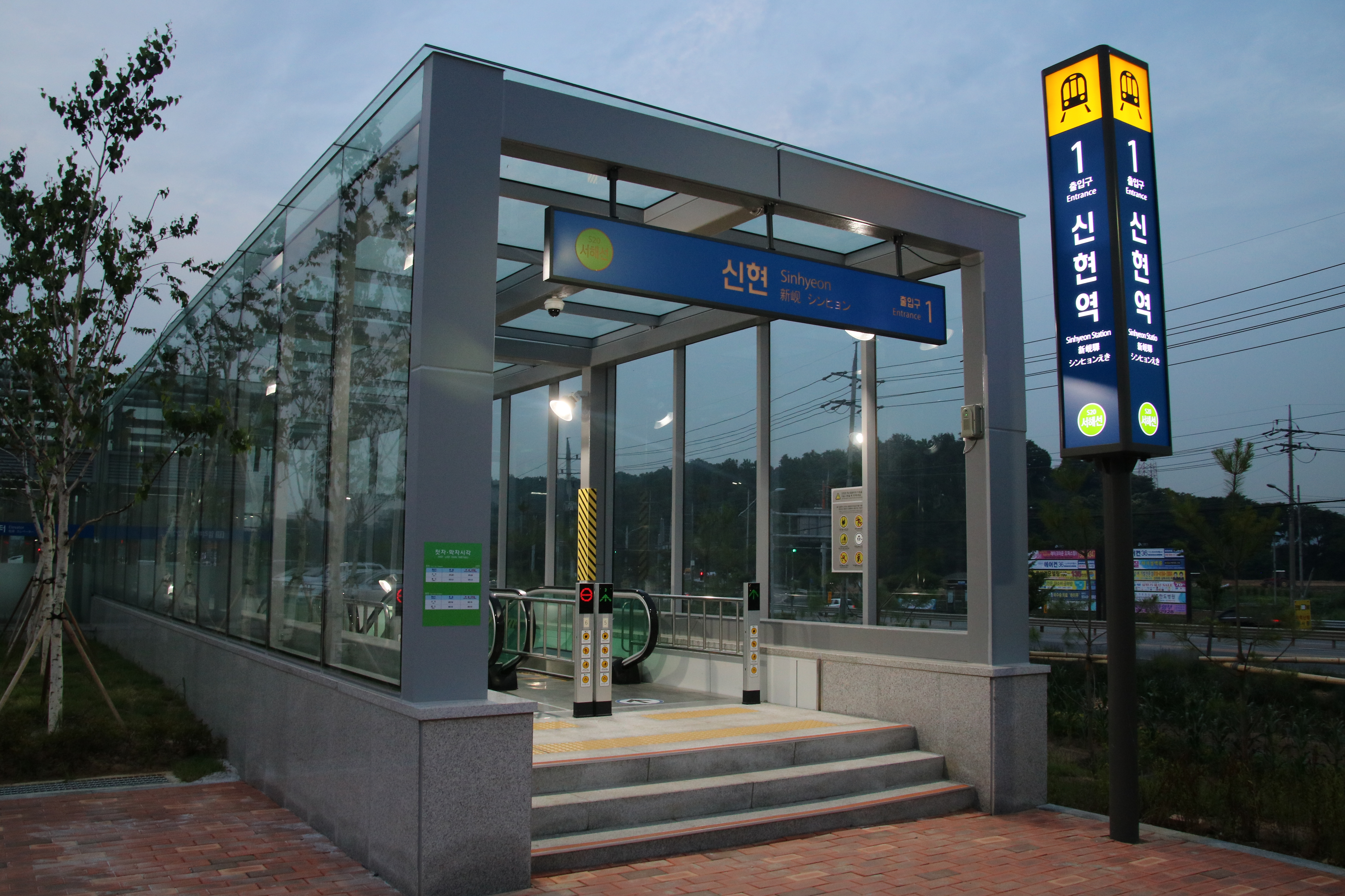 신현역 1번 출입구